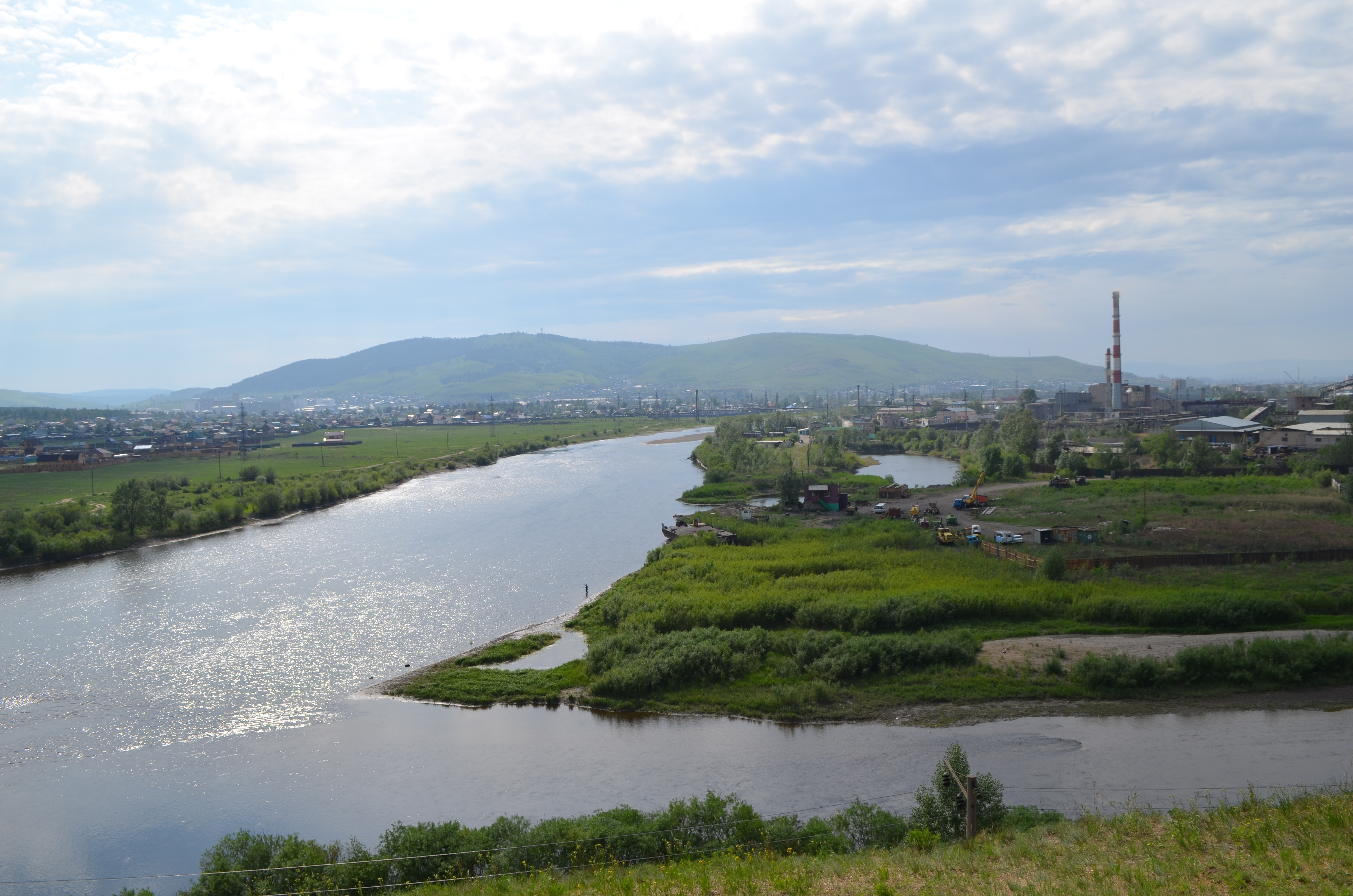 снимки конца июня - начала июля 2015 г.